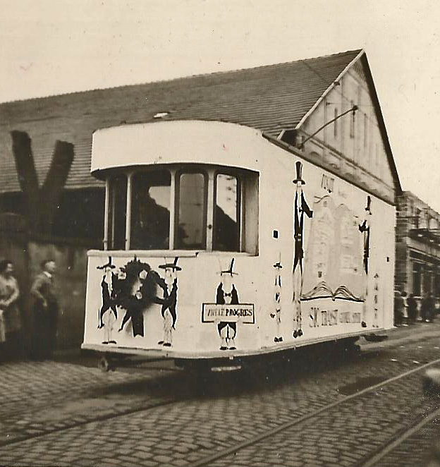 Funérailles du tramway de Strasbourg le 1er mai 1960 (photo de famille libre de droits)